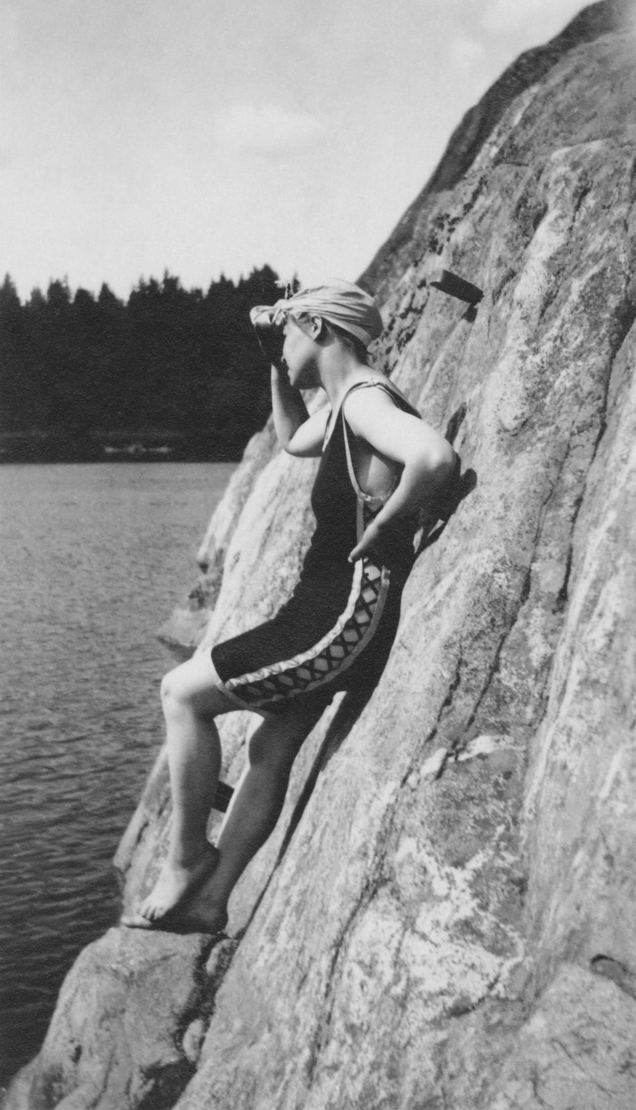 Anna Kattainen Humallahden uimalan kallioilla. -- vedos, paperi, mv